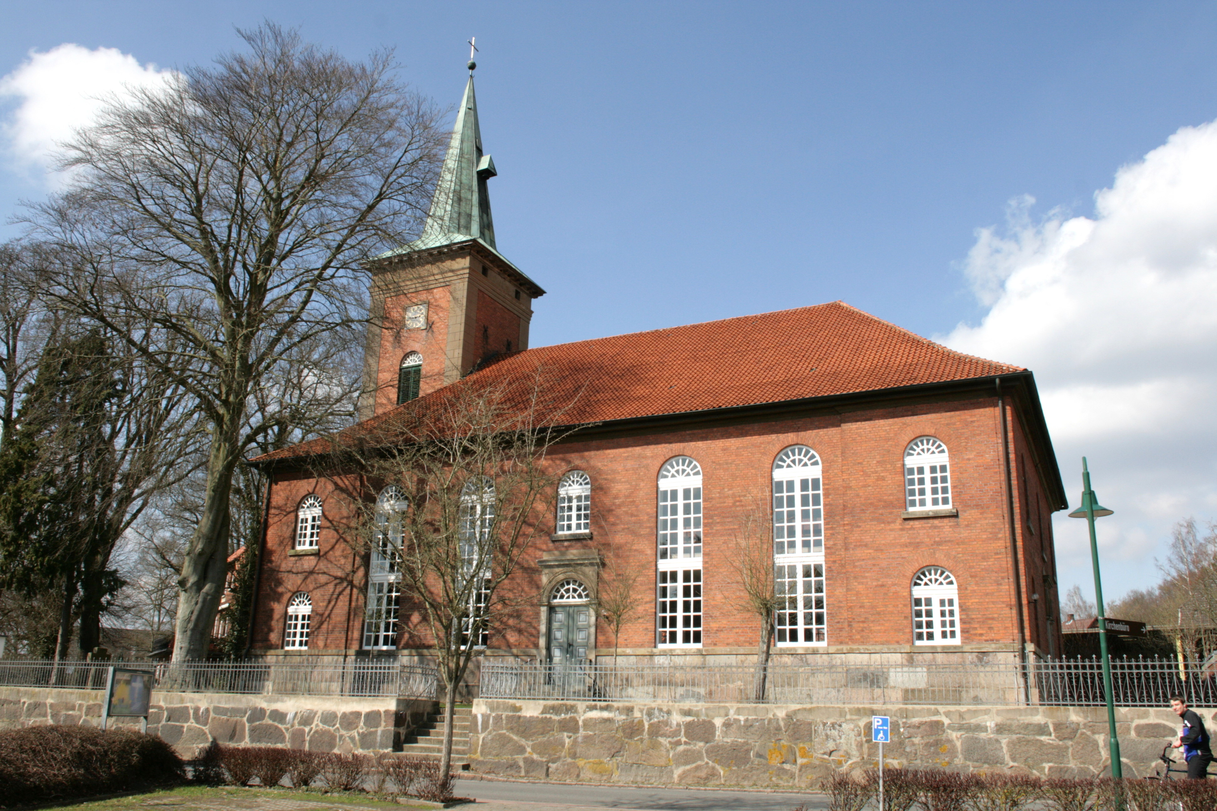 St. Bartholomäus, Göhrdestraße in Himbergen